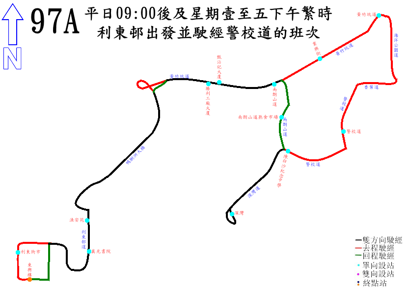 中文（香港）: 城巴97A線(只適用於平日早上尖峰時間以後)的走線圖